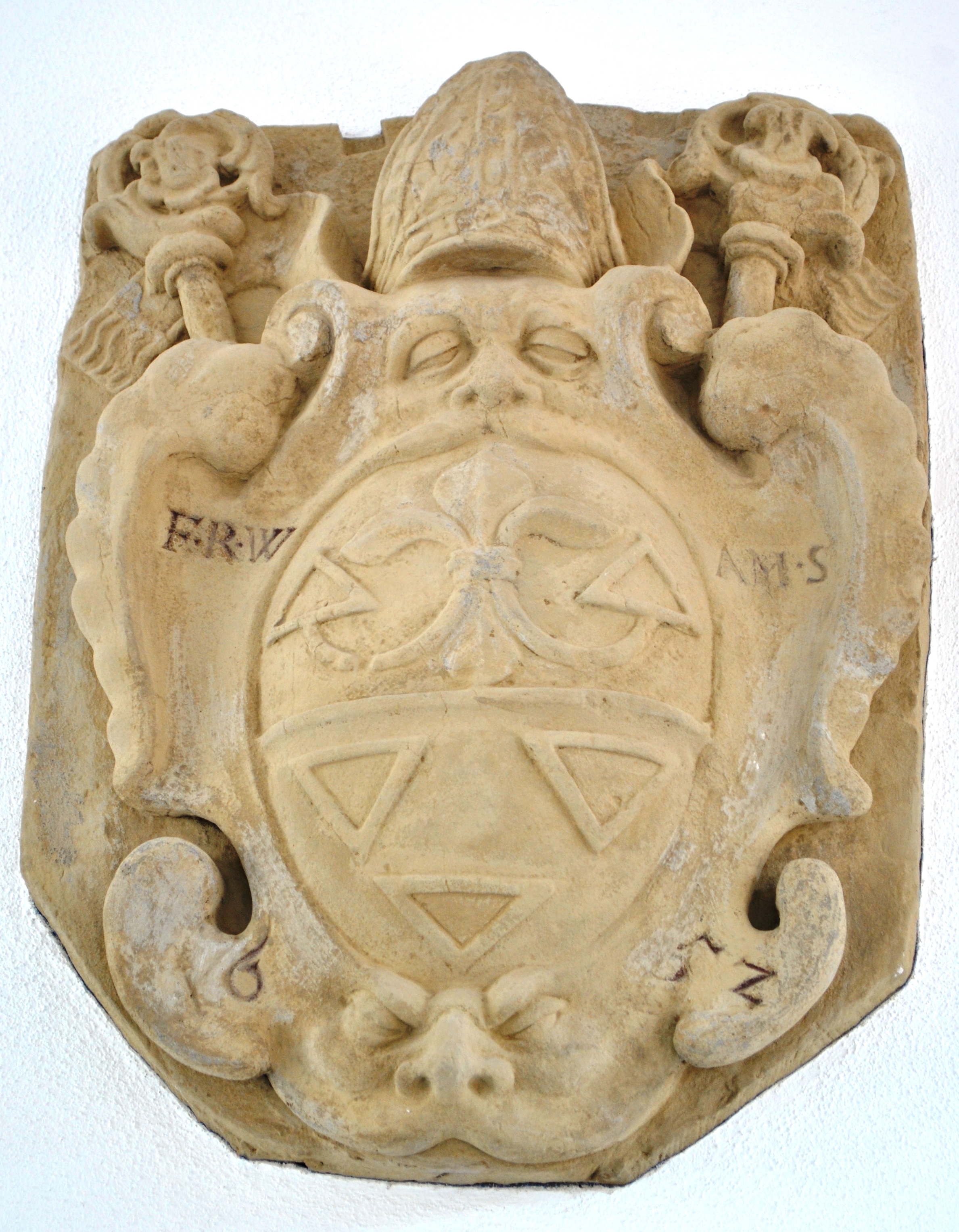 Wappen Abt Remigius Winckel, Torhaus Abtei Münsterschwarzach